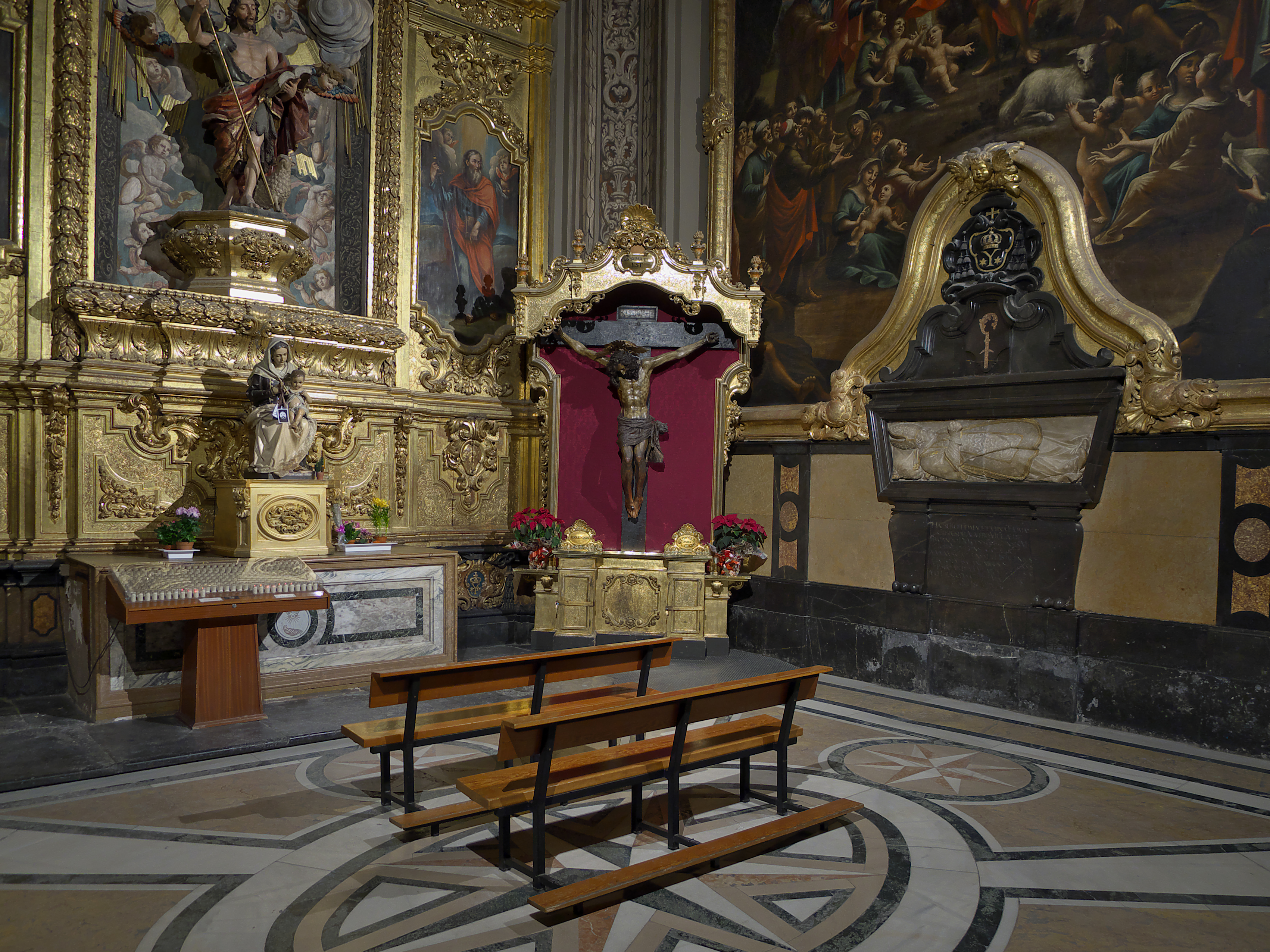 Capilla funeraria del arzobispo Tomás Crespo Agüero (h. 1743). Recibe devoción una talla de Crucificado atribuido a la Escuela granadina.